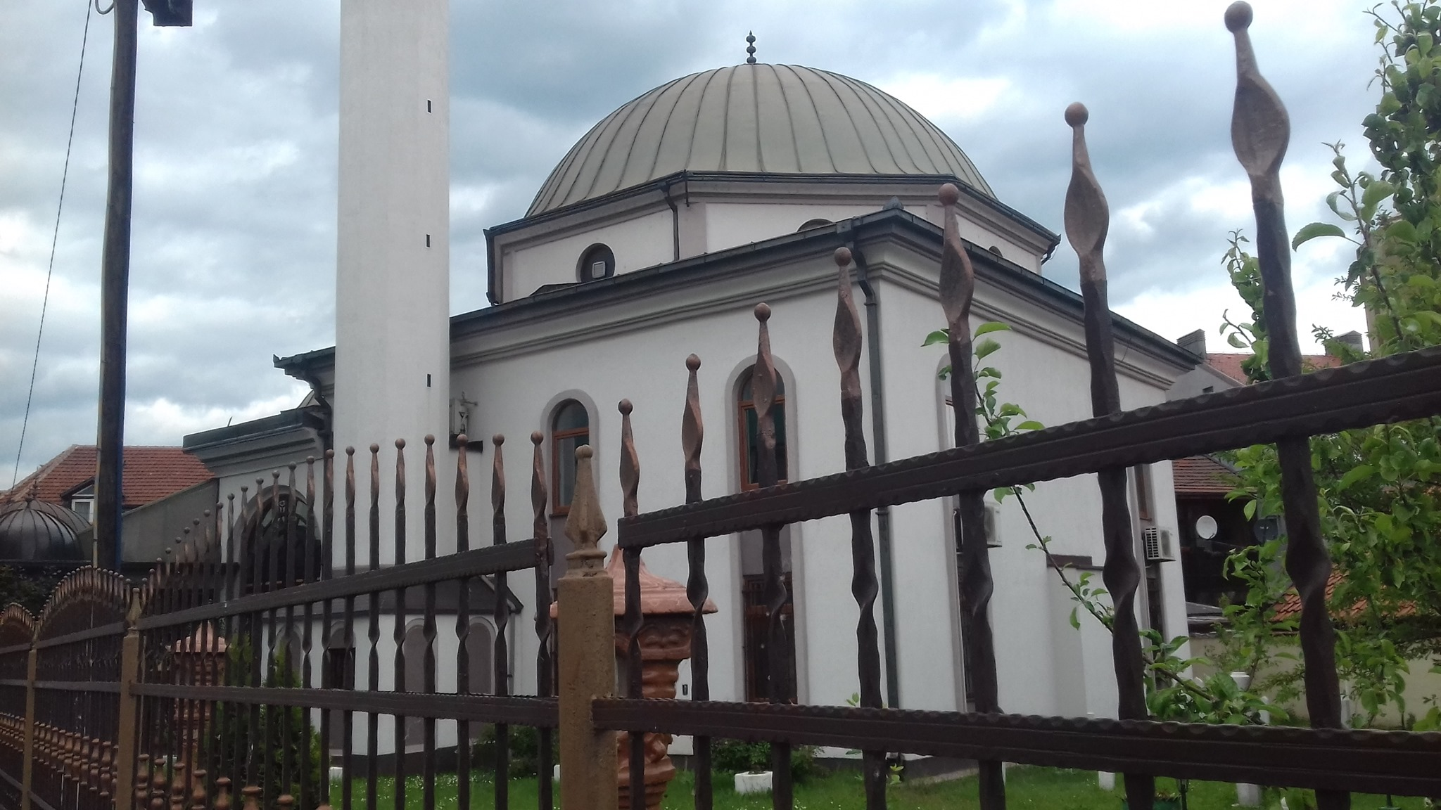 Кочевска џамија